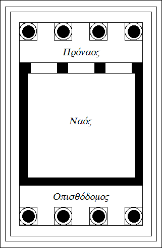 Κάτοψη του Ναού της Αθηνάς Νίκης στην Ακρόπολη των Αθηνών